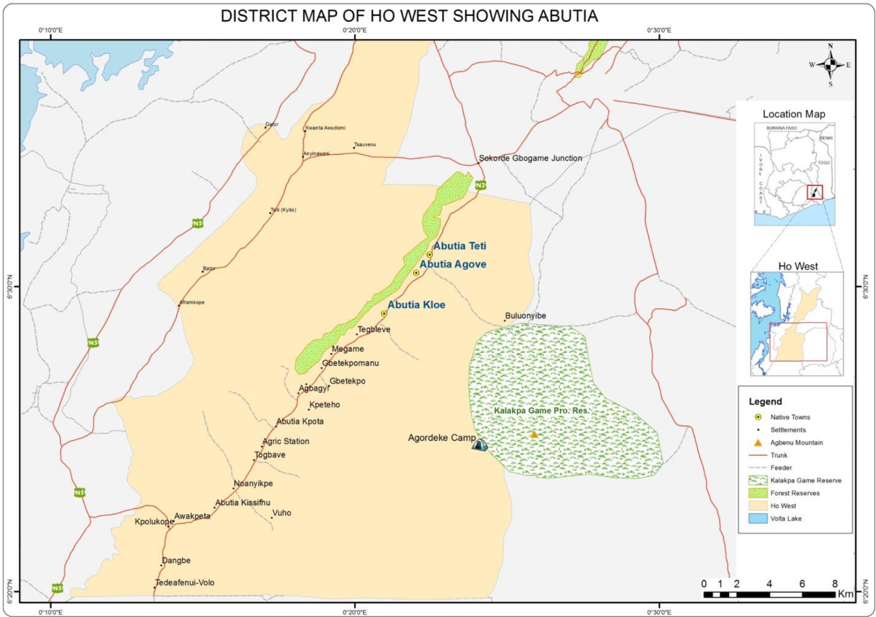 Abutia Map